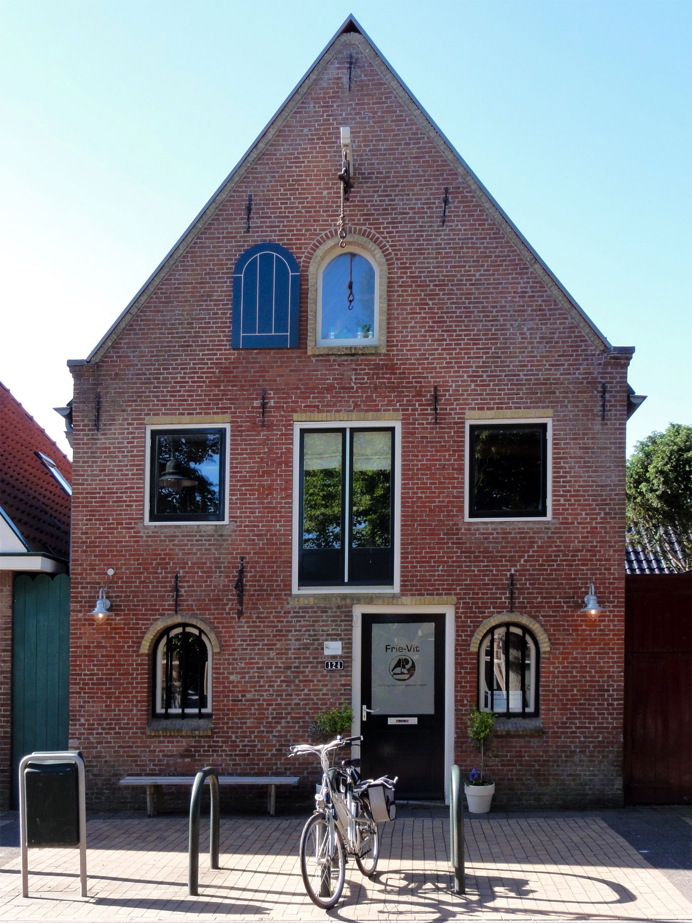 Van_Harenstraat 124 in Sint-Annaparochie